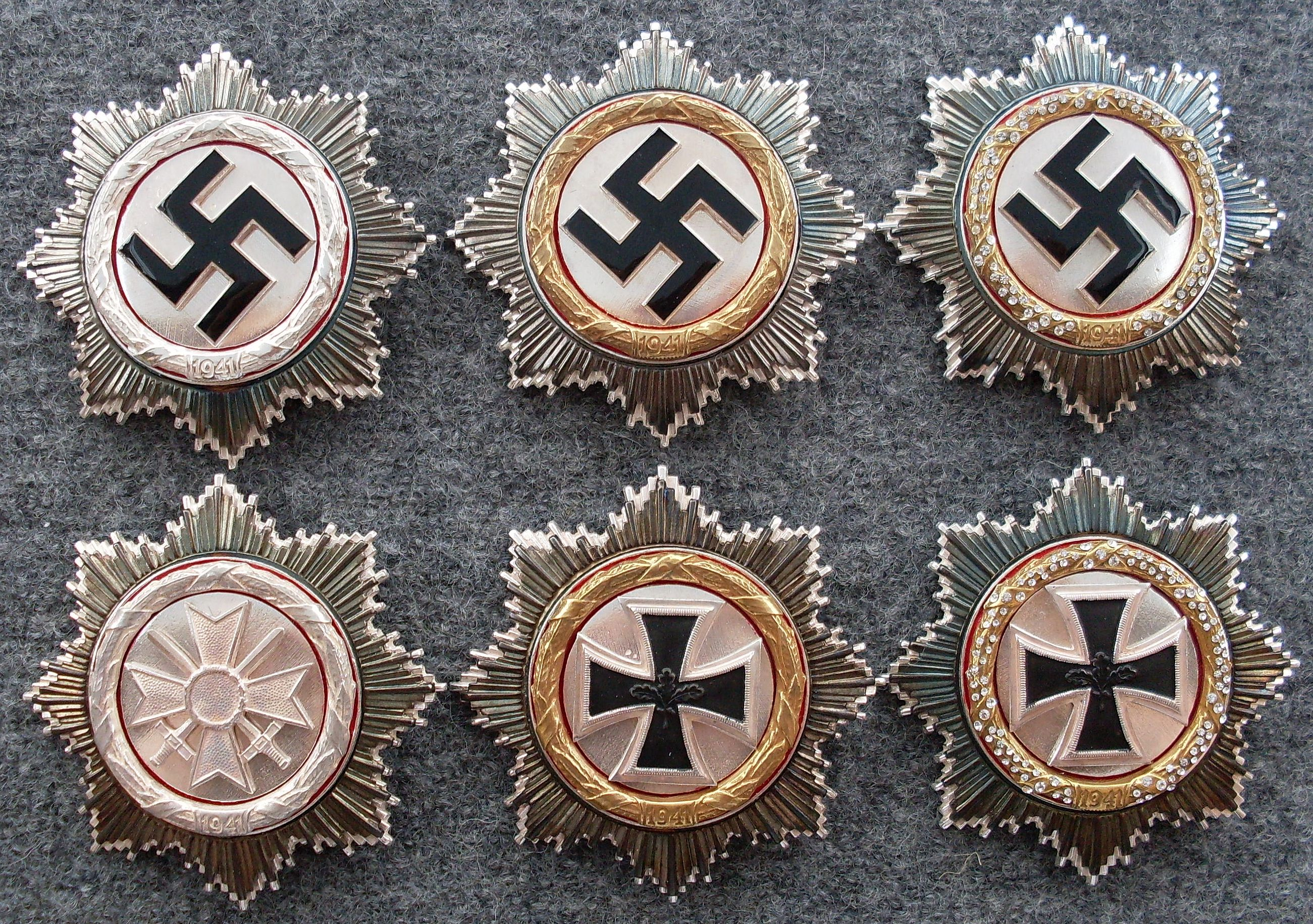 1. Zeile von links nach rechts: Deutsche Kreuze in Silber, Gold und Gold mit Brillanten in der vorschriftsmäßigen Stiftungsform. 2. Zeile von links nach rechts: Deutsche Kreuze in Silber, Gold und Gold mit Brillanten in der sog. 57er Form. (alle Teile Repliken)